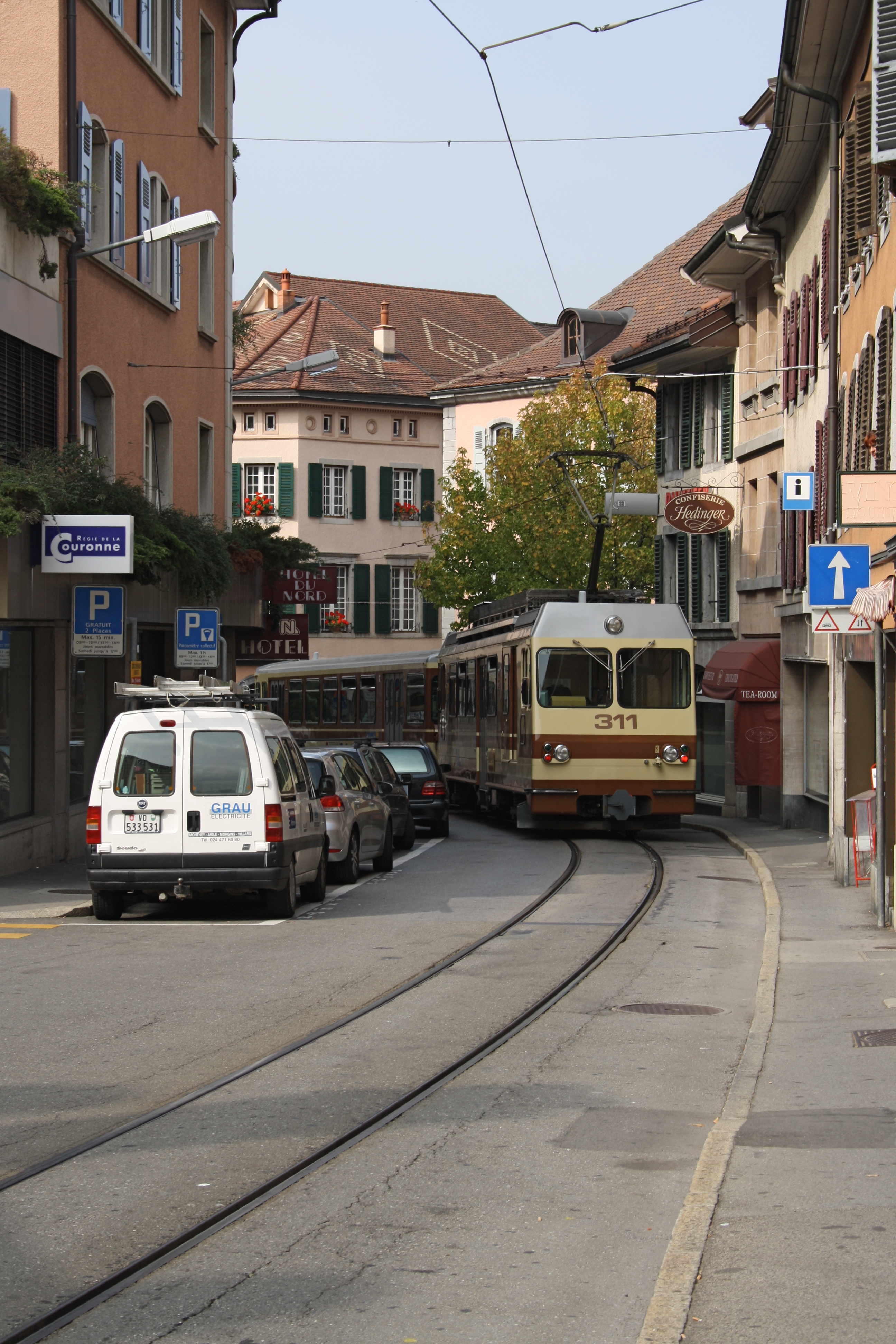 Zug der AL in Aigle